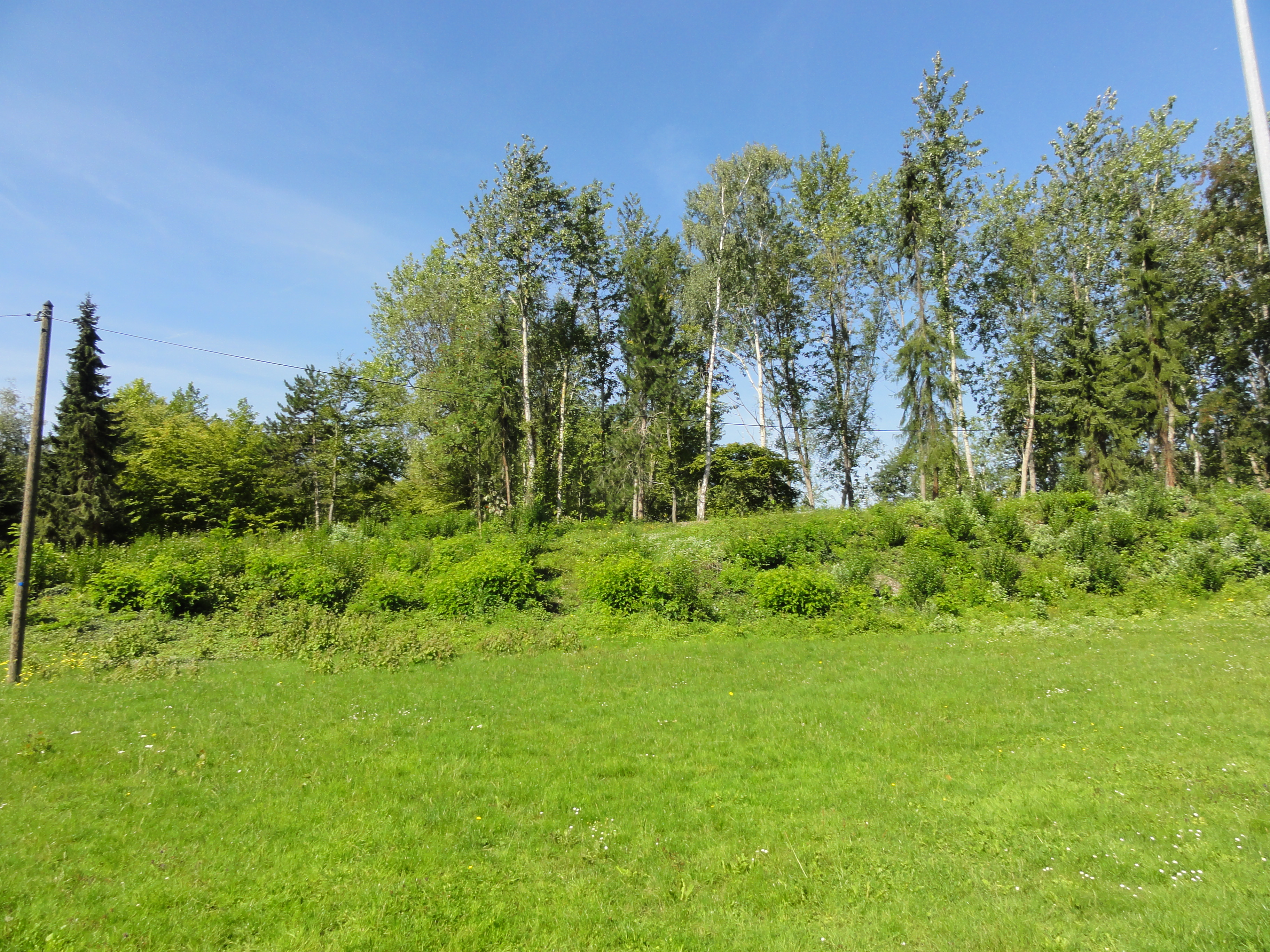 Terril n° 163A dit Enclos Nord, disparu, Fosse Enclos de la Compagnie des mines d'Anzin, Denain, Nord, Nord-Pas-de-Calais, France.